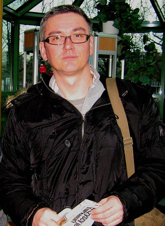 Artur Orzech (ur. w 22 lutego 1964 roku w Jeleniej Górze) - polski dziennikarz muzyczny, prezenter radiowy i telewizyjny, konferansjer.